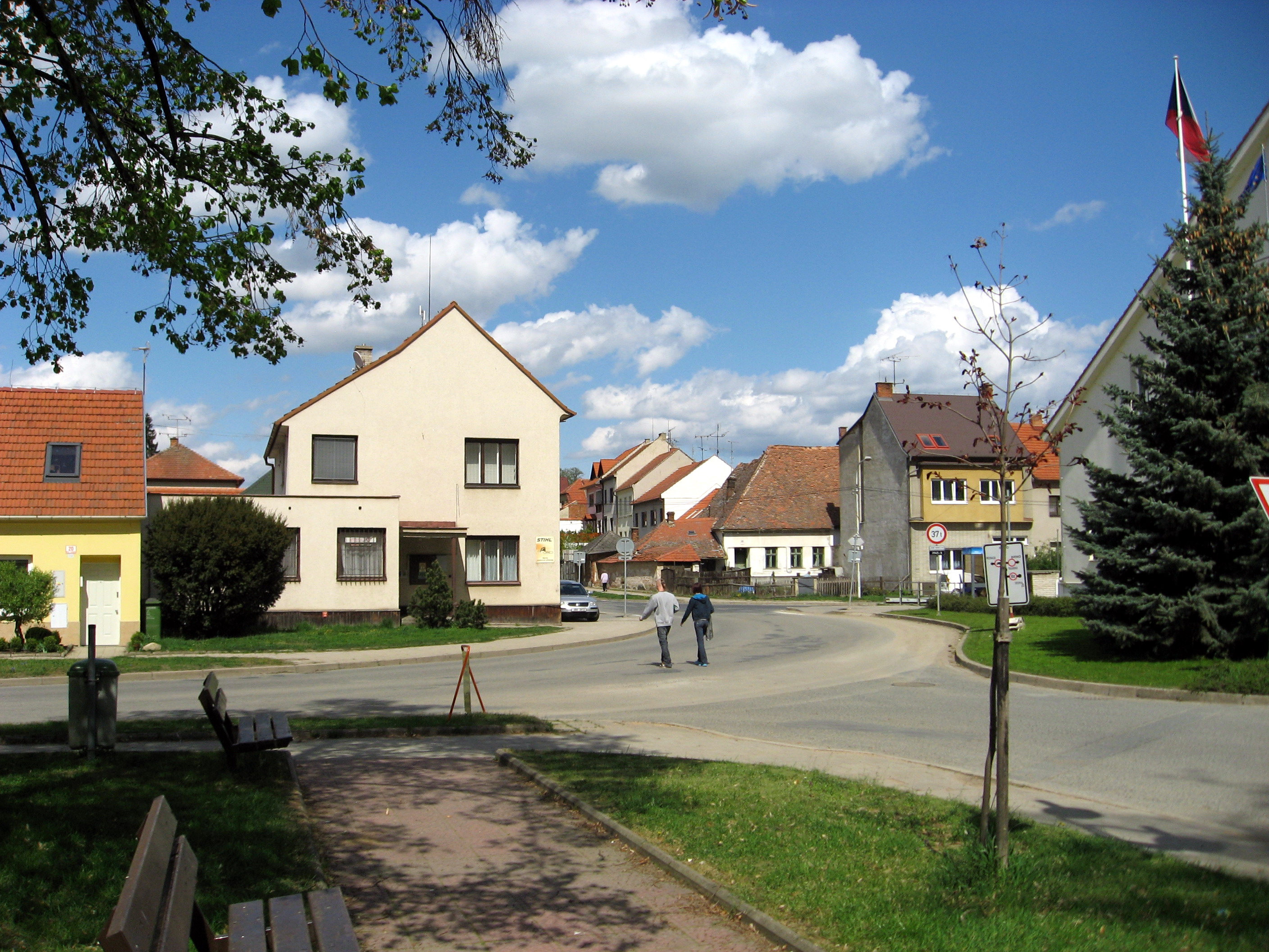 Střelice, cetrum obce